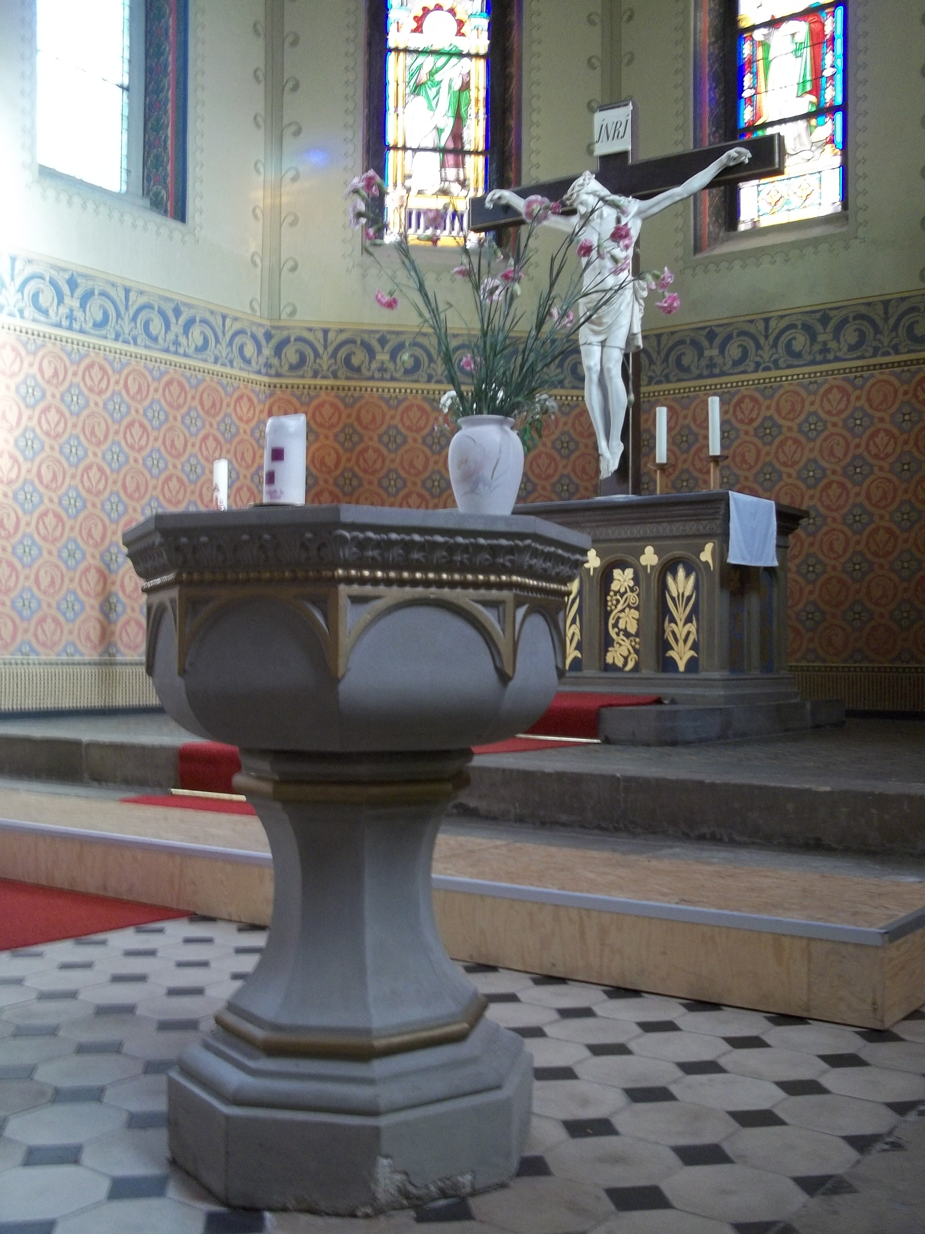 Kirche Leopoldshall: Taufstein und Kruzifix